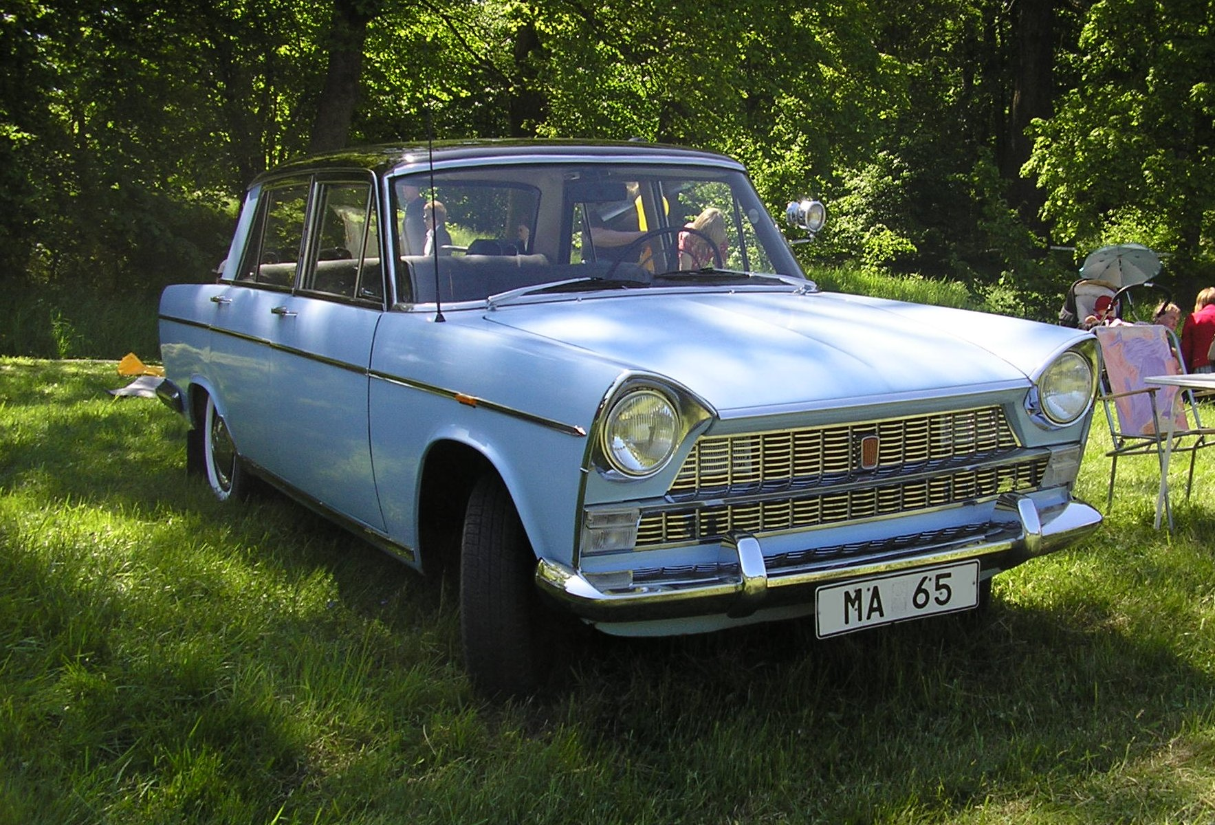 1959 Fiat 2100 DeLuxe